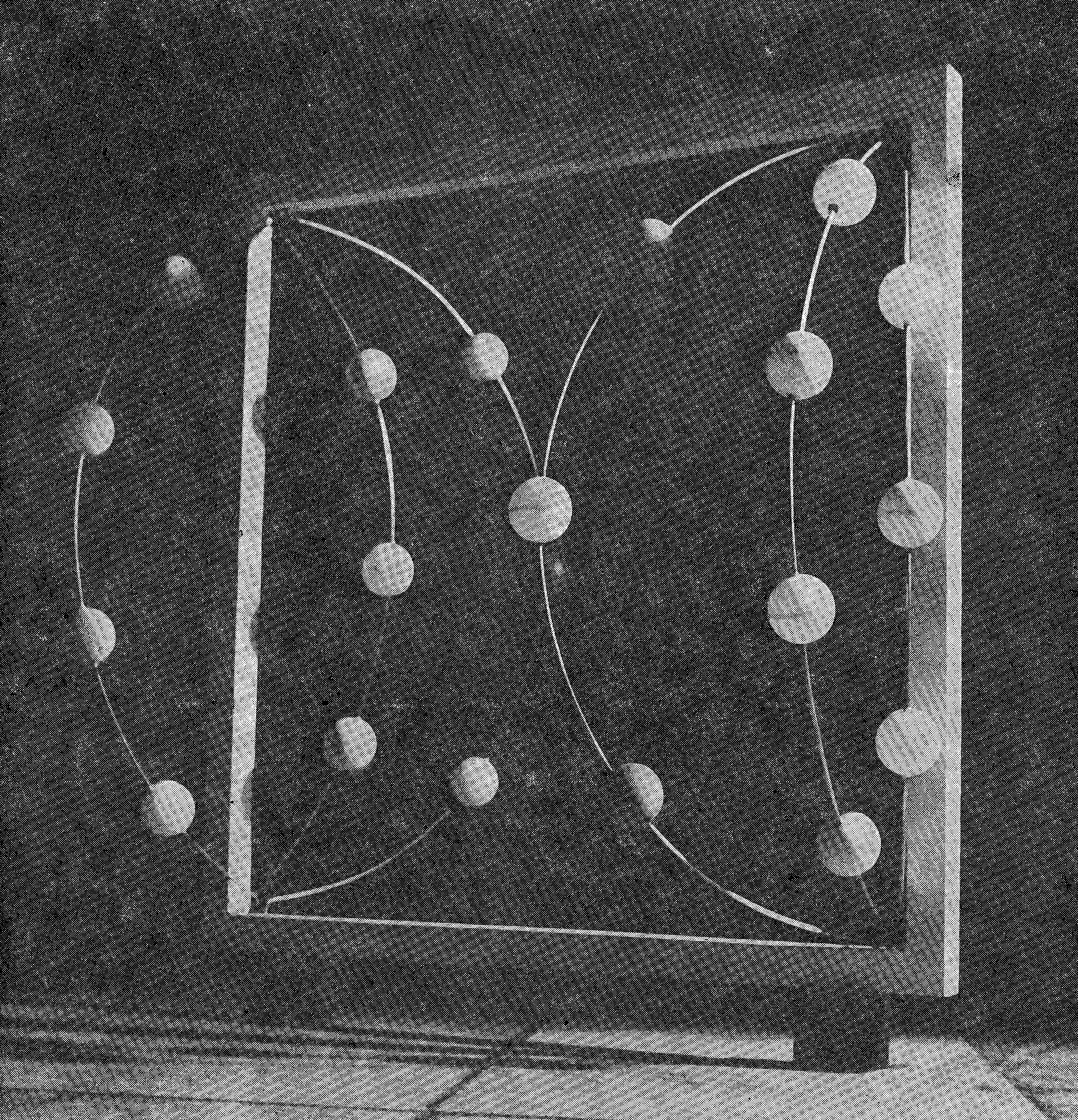 Wanda Gołkowska, projekt formy przestrzennej pt. "Kompozycja z elementów ruchowych", 1970. Miejsce prezentacji: Sympozjum Plastyczne Wrocław '70, Wrocław, 1970. Fotografia: najprawdopodobniej Jan Bortkiewicz lub Michał Diament lub Zdzisław Holuka lub Czesław Żuk. Źródło: "Sympozjum Plastyczne Wrocław '70", red. Danuta Dziedzic, Zbigniew Makarewicz, Zjednoczone Przedsiębiorstwa Rozrywkowe Ośrodek Teatru Otwartego "Kalambur", Wrocław 1983, s. 82-83.